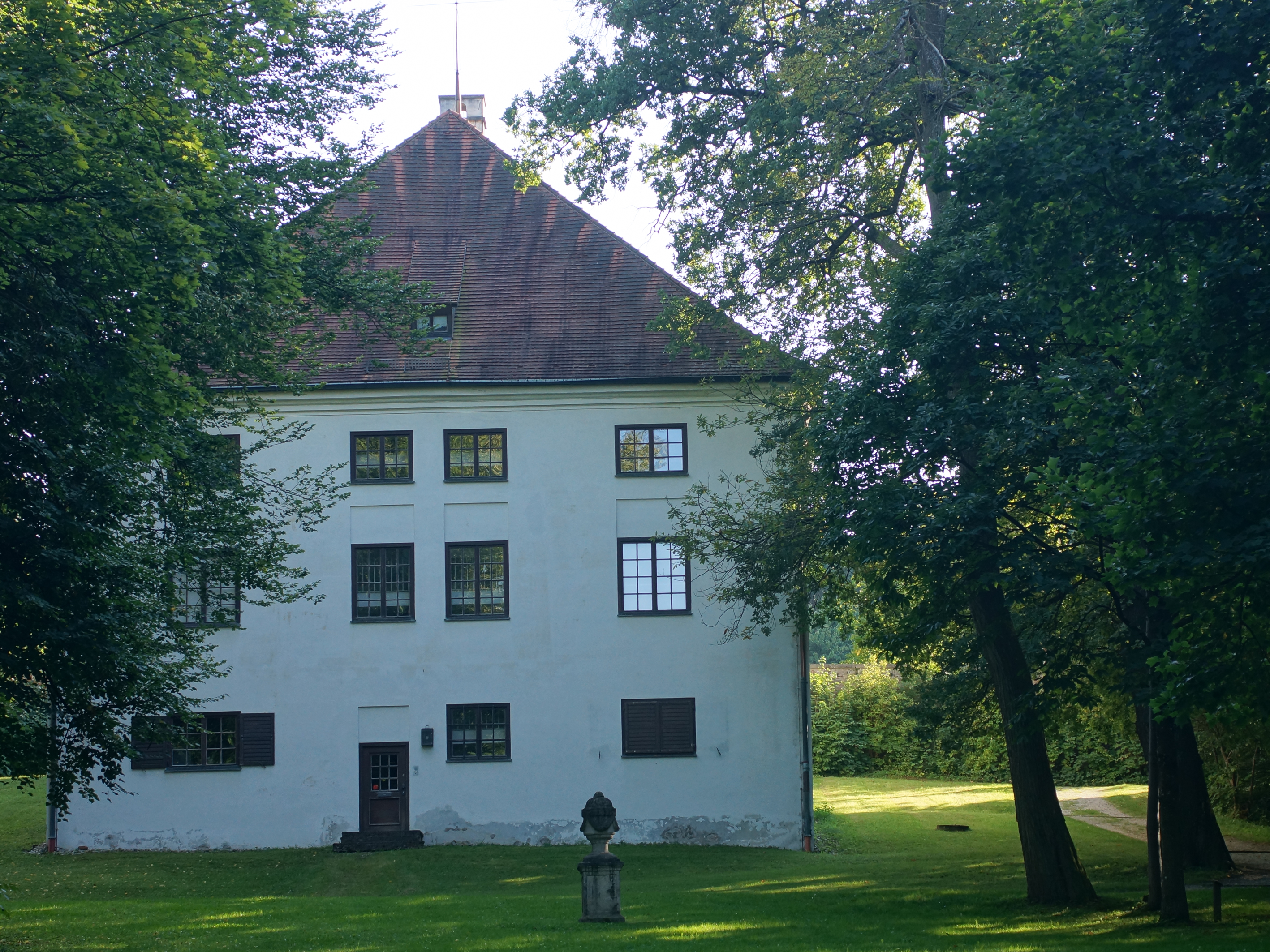 Landshut, Herzogsgarten, Schloss This is a photograph of an architectural monument.